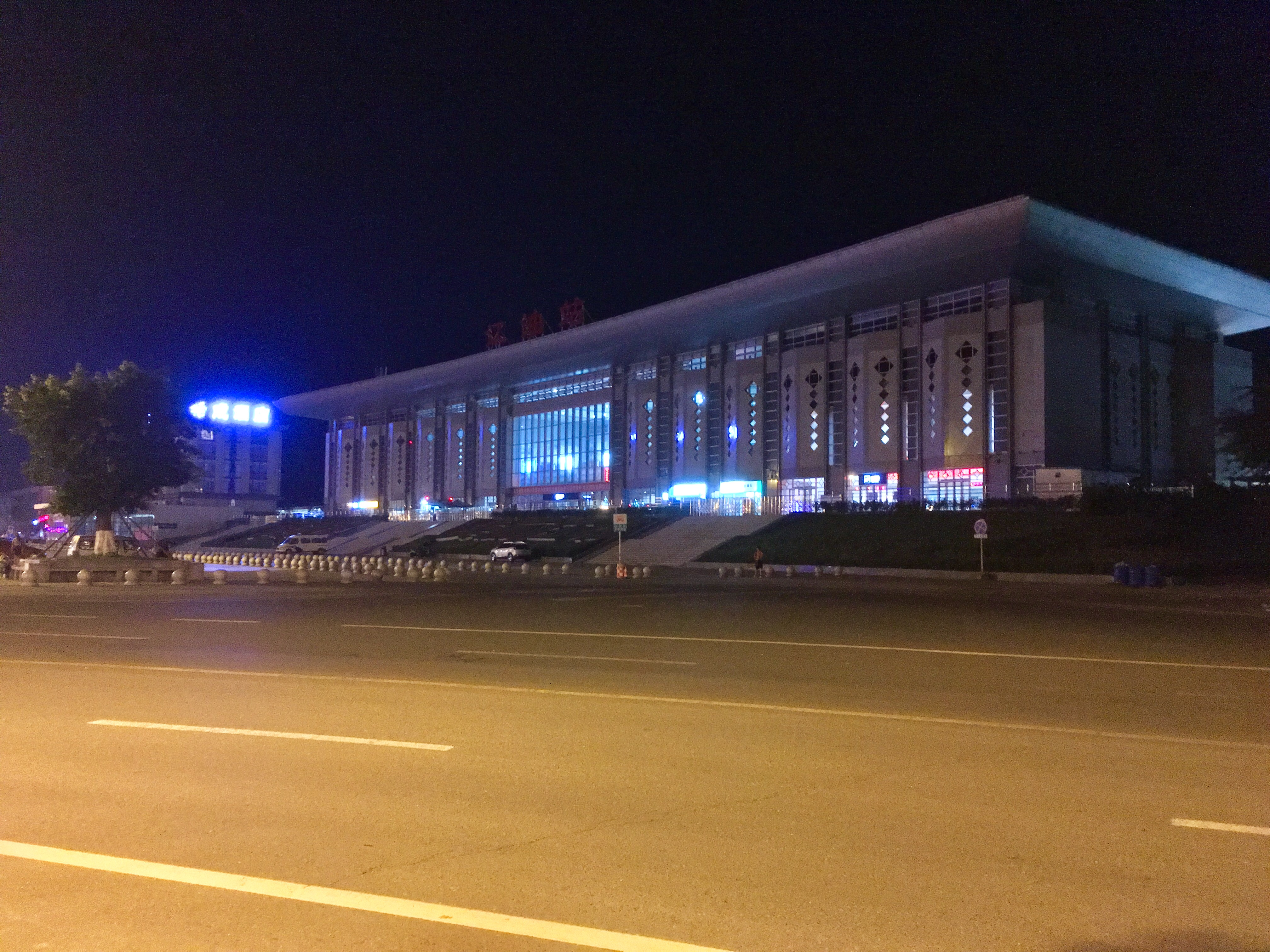 iphone se拍摄